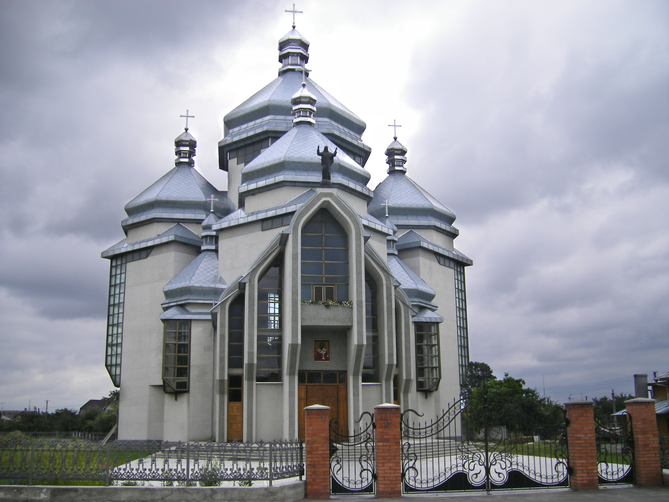 Radekhiv